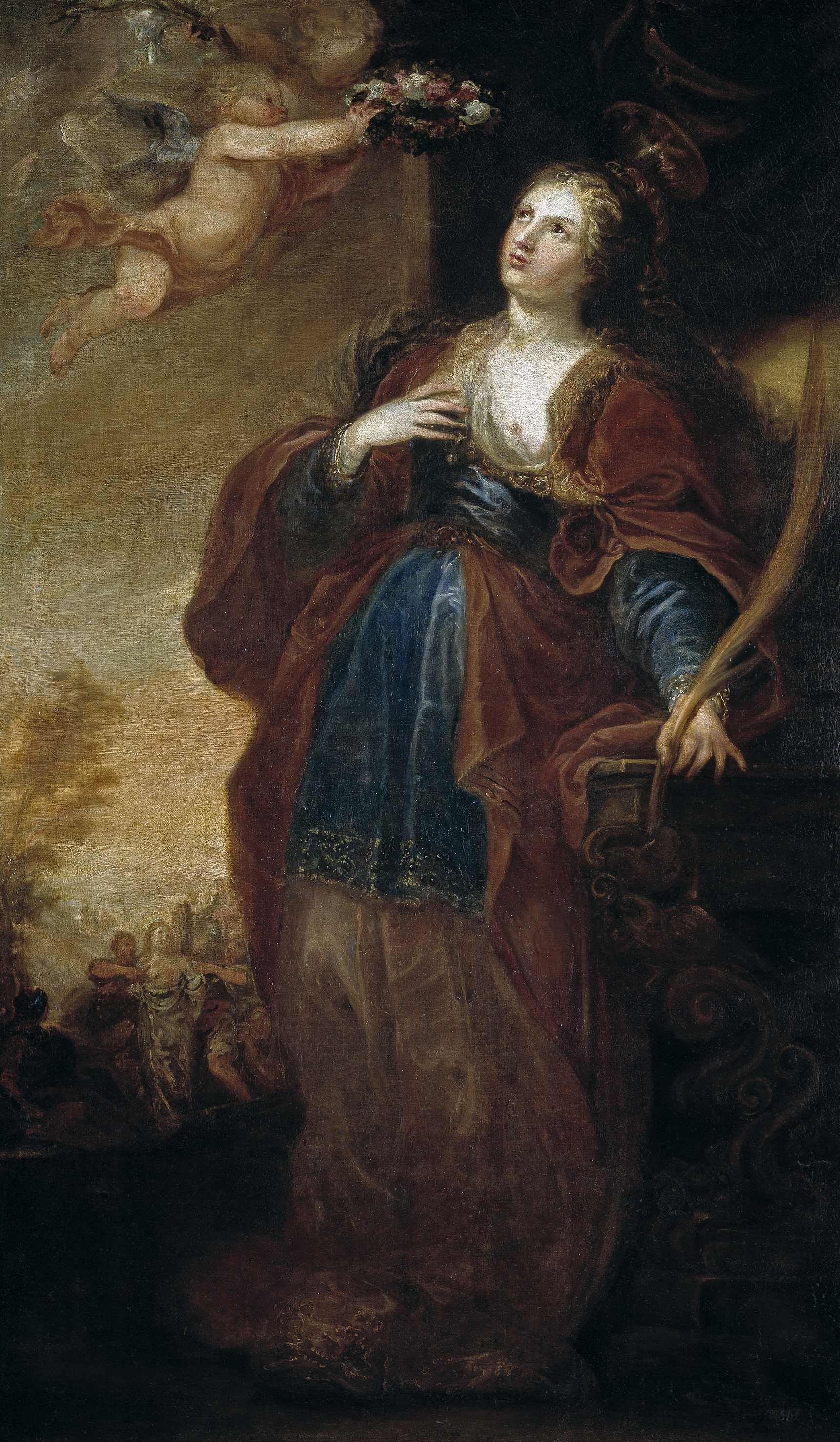 La obra representa a la virgen y mártir Santa Águeda de Catania, que según la tradición murió durante la persecución decretada contra los cristianos por el emperador Decio.